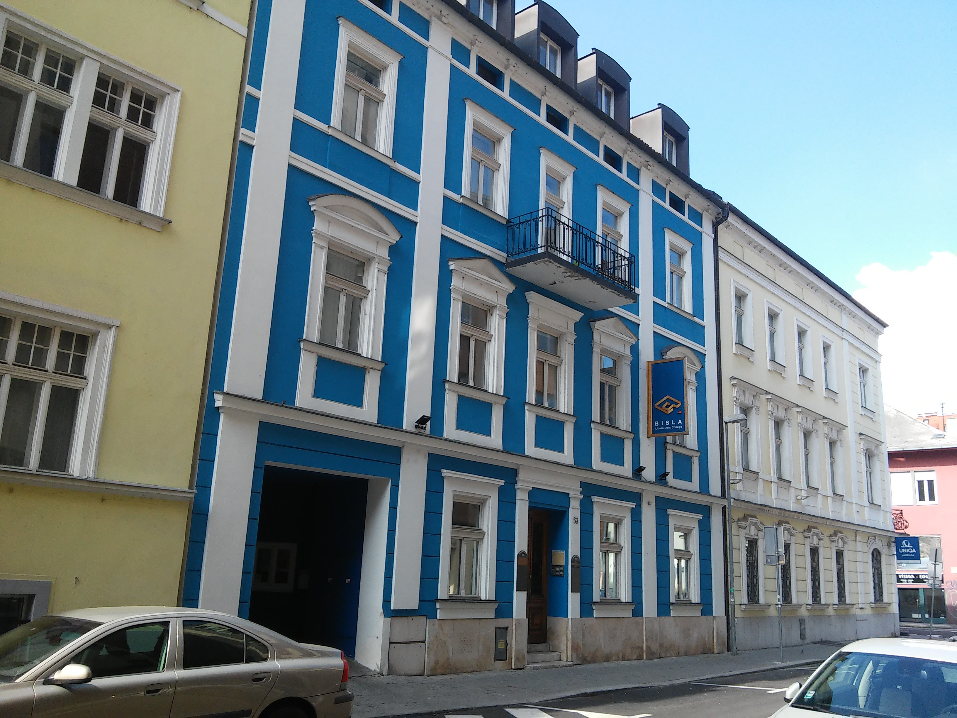 Grosslingová, Staré Mesto, Bratislava